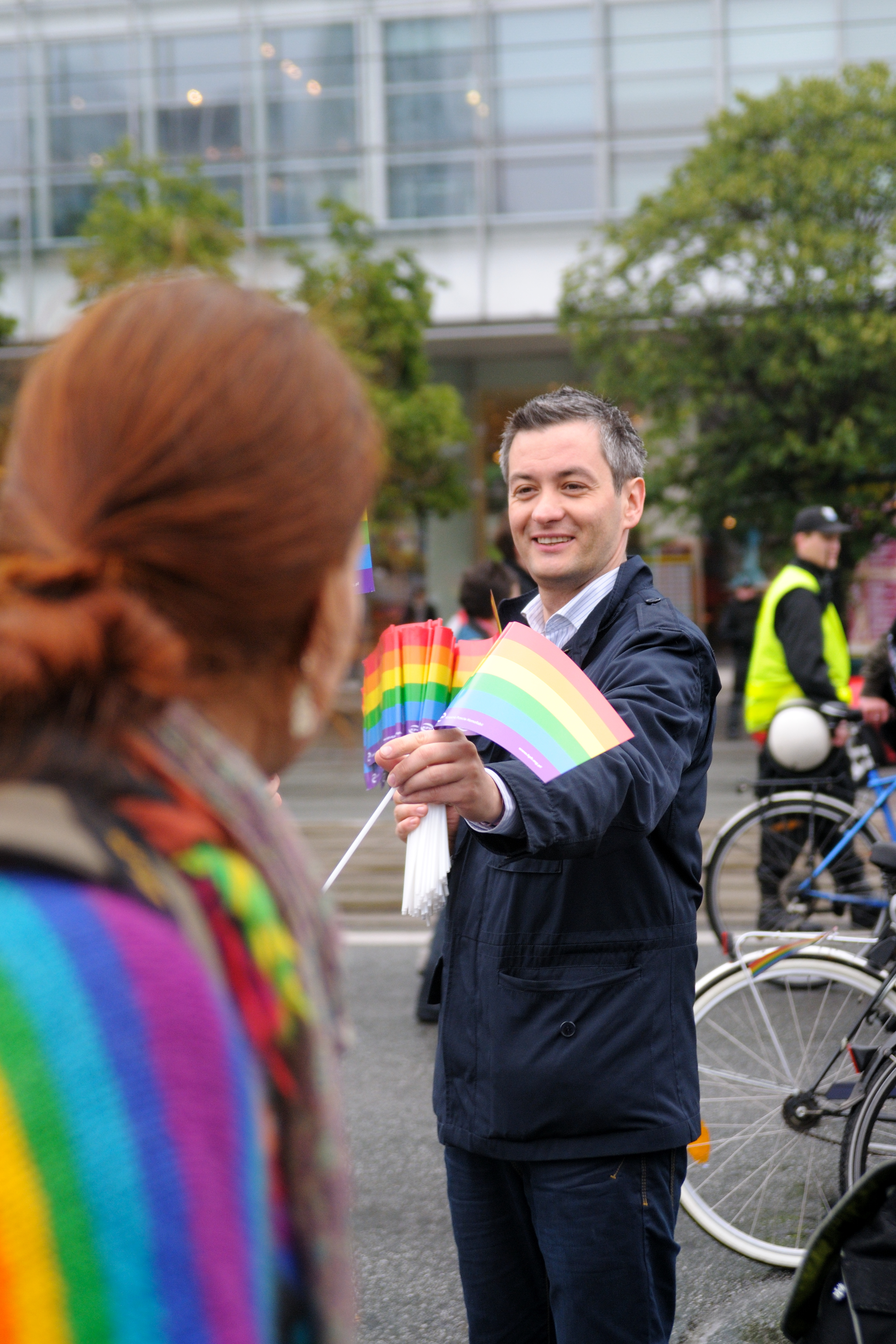 Parada Równości 2009